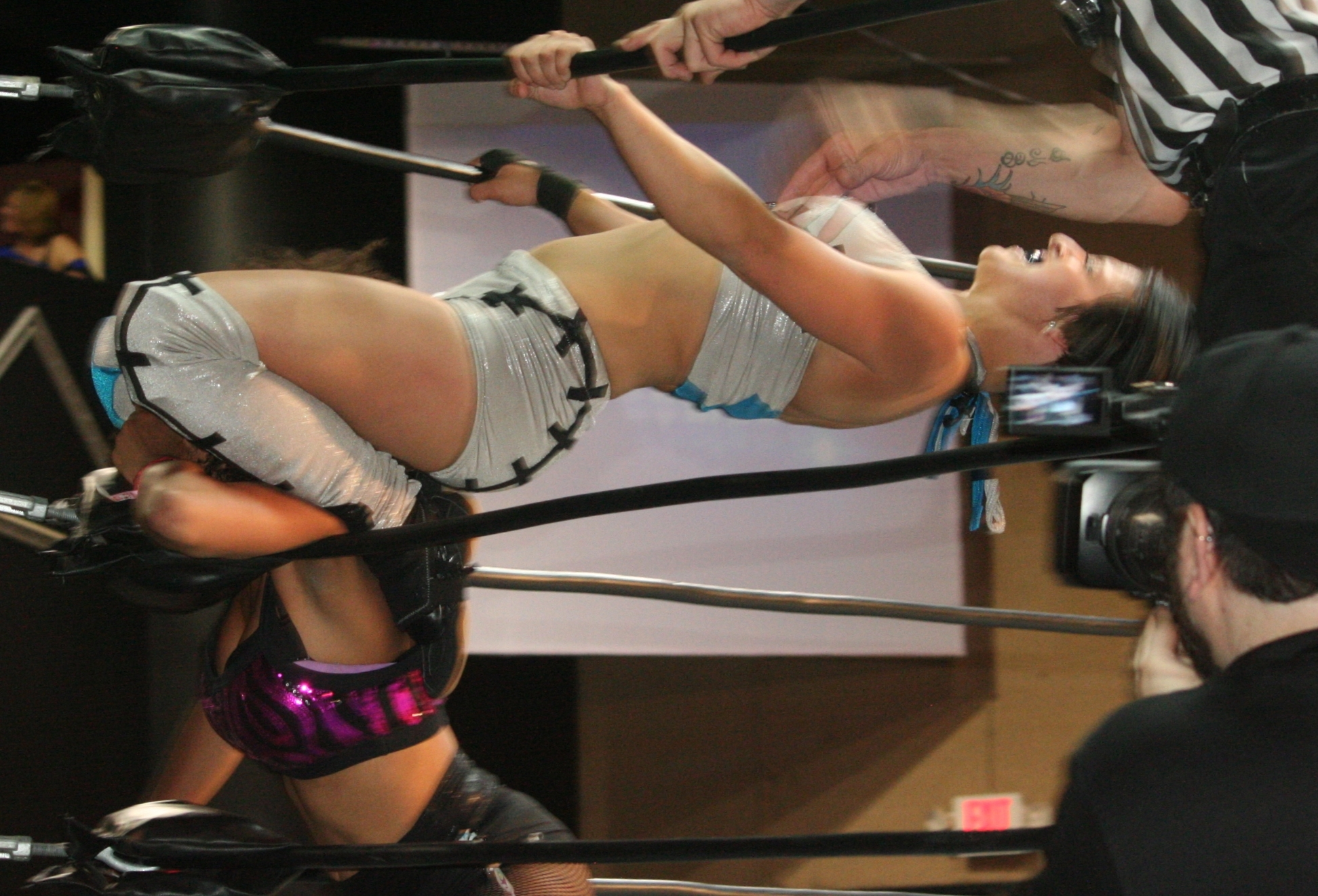 Marti Belle vs. Heidi Lovelace